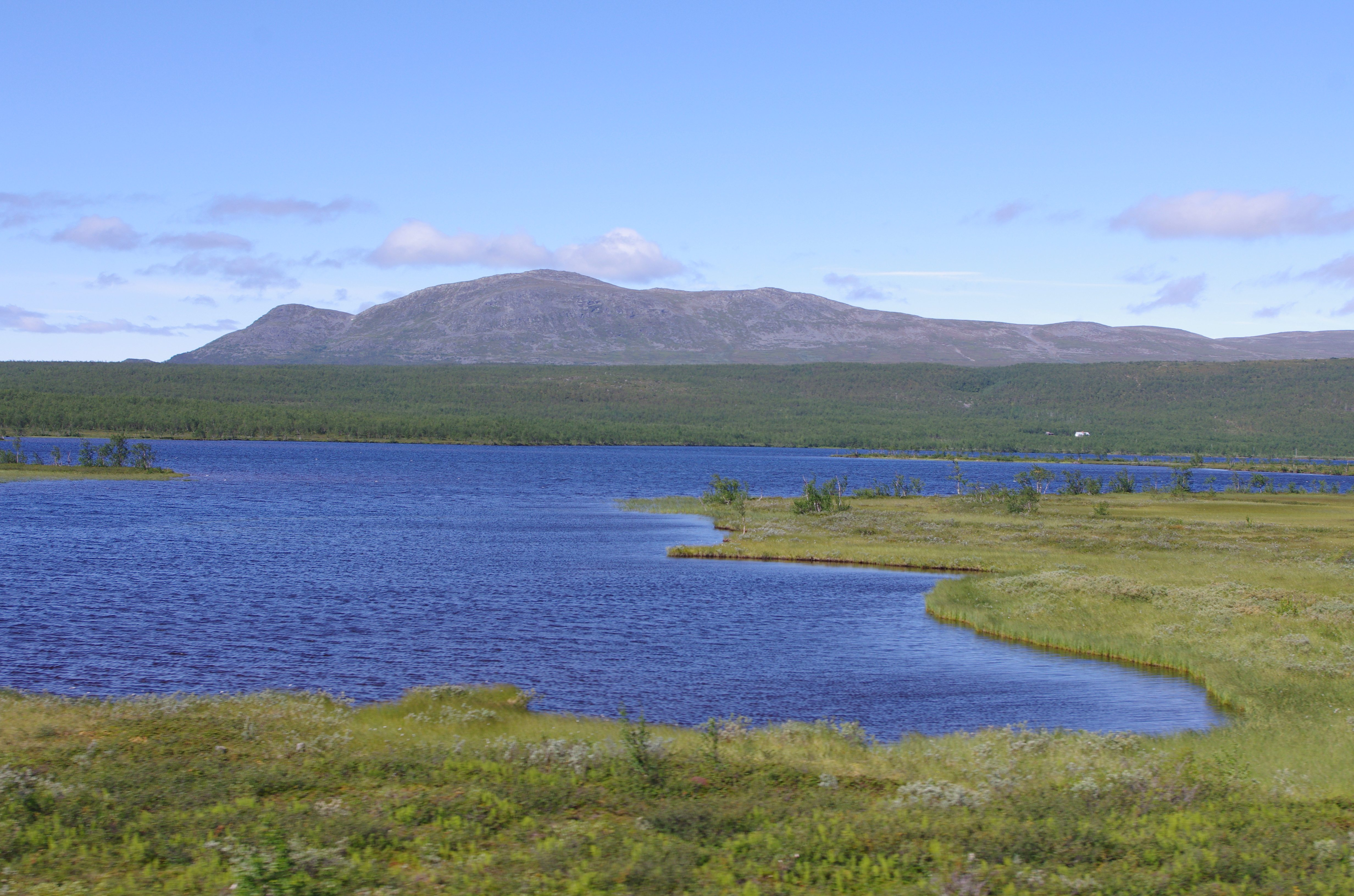 Sjön Njuotjanjaure (Njuohčamjávri) i Kiruna kommun i Lappland i Sverige. I bakgrunden syns fjällen Rohapi (1016 m) och Bálggesčorru (1007 m)